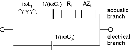 Butterworth-van Dyke equivalent cuircuit for quartz crystal mirobalance